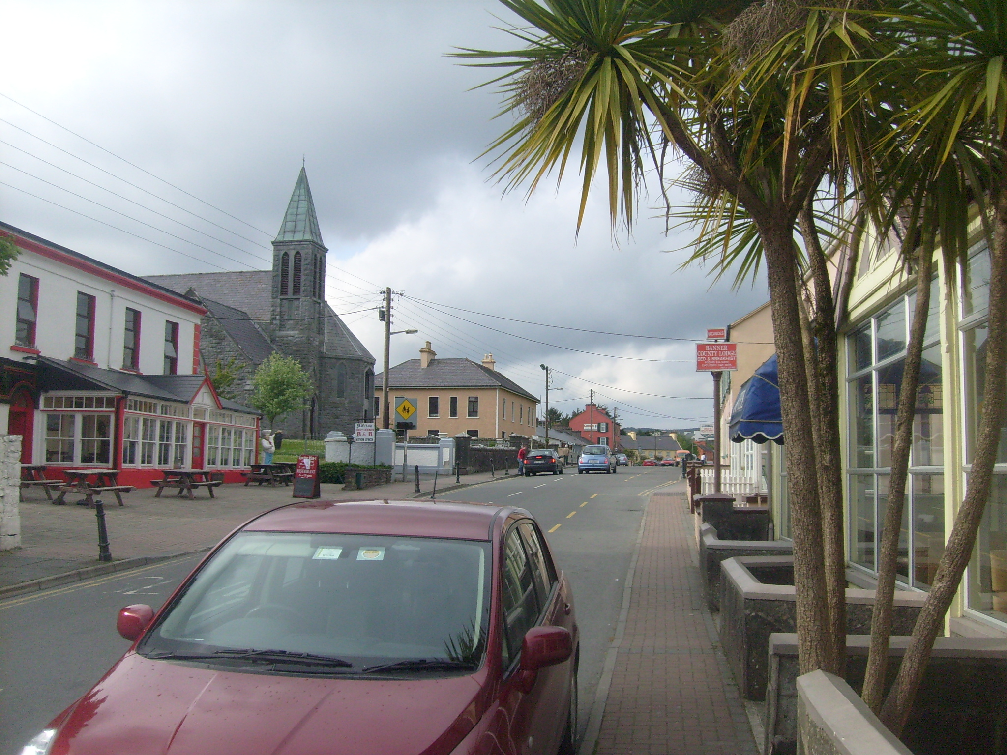 Lisdoonvarna, Co Clare, Éire